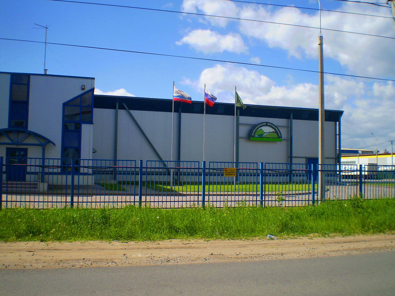 Коммунально-складская зона города Всеволожска.